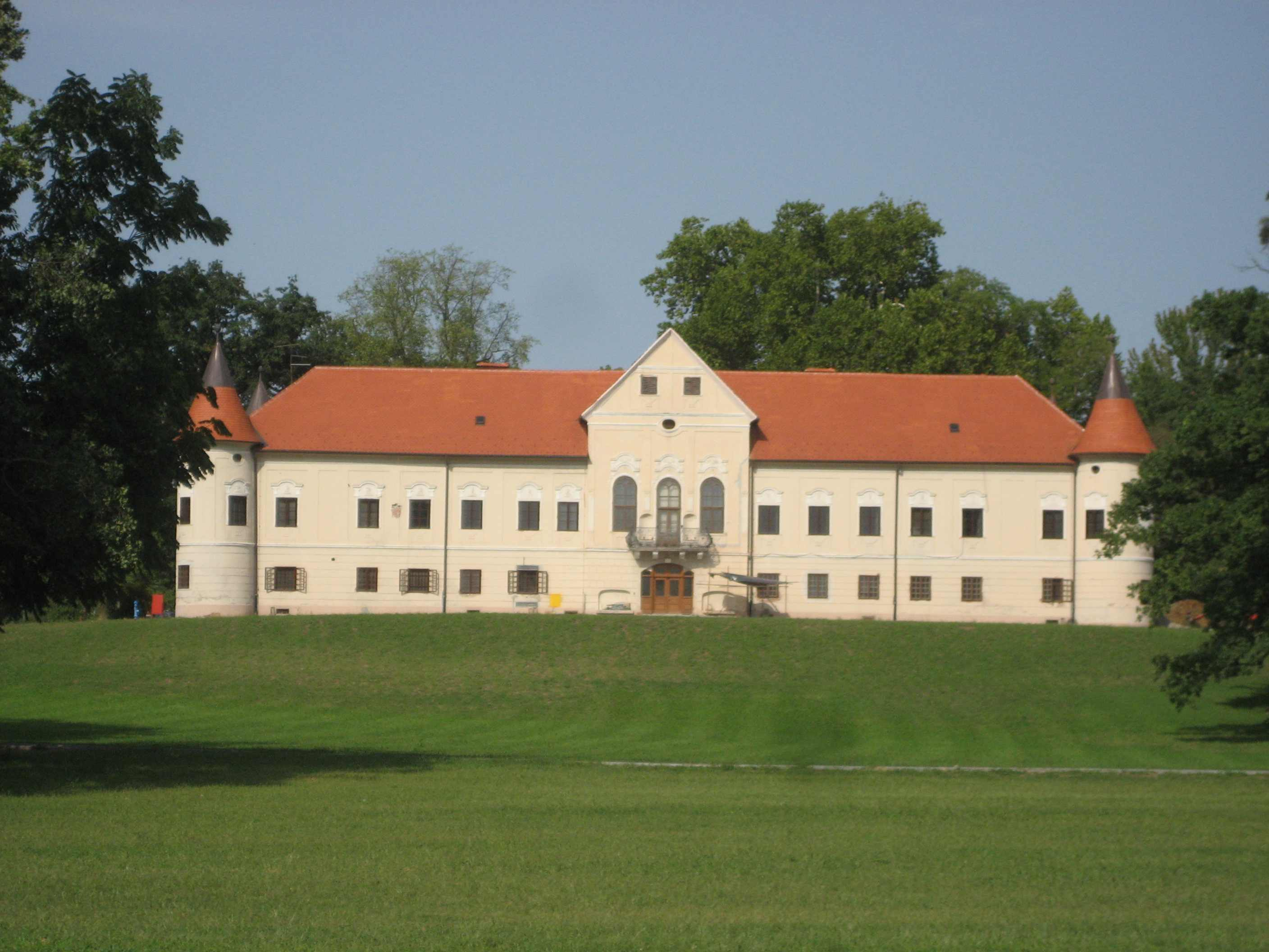 Zaprešić